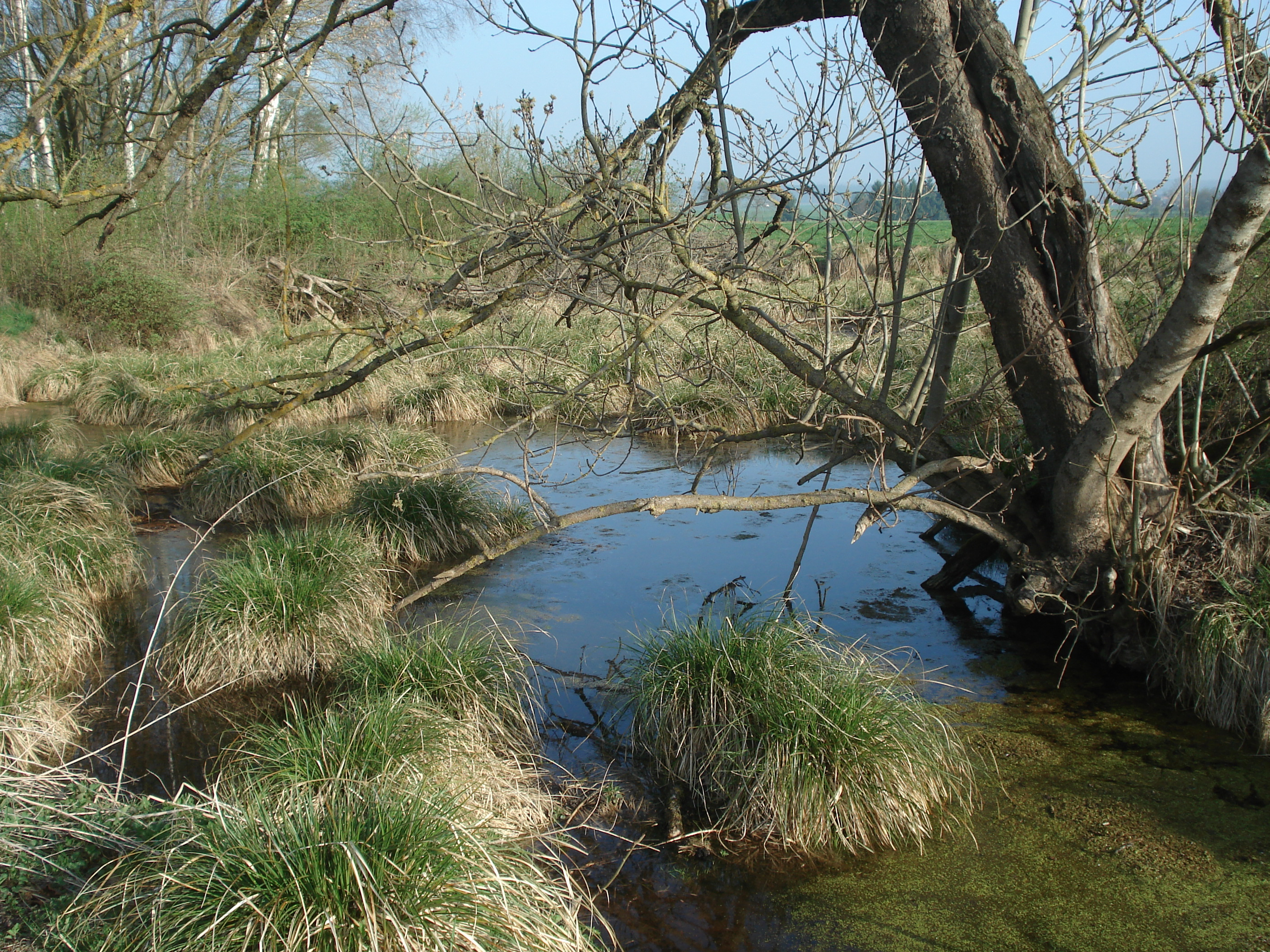 Karstquelle Roter Brunnen bei Wittislingen an der Egau in Bayern